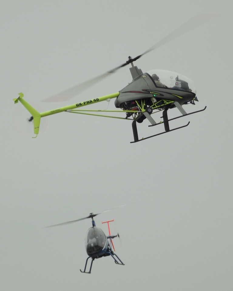 Zdjęcie zrobione podczas drugiego dnia VIII Małopolskiego Pikniku Lotniczego w Krakowie-Czyżynach.